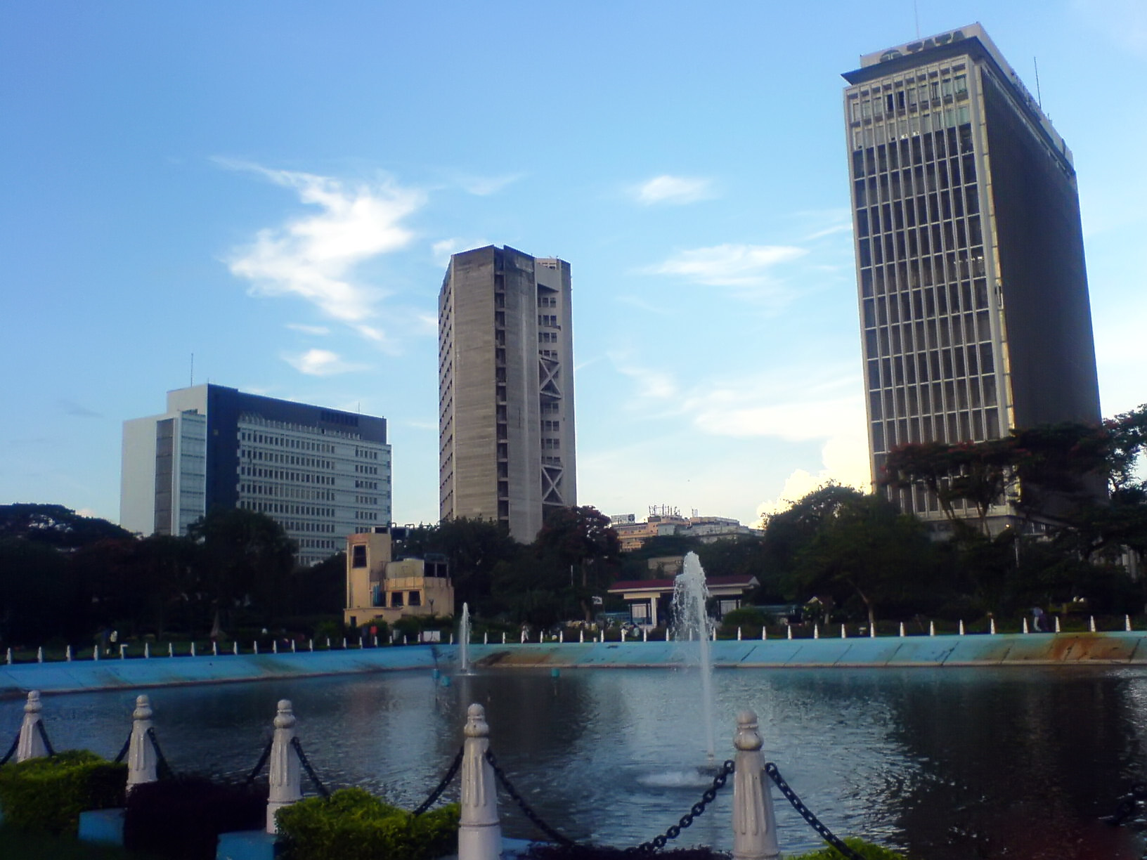 The Kolkata skyline.